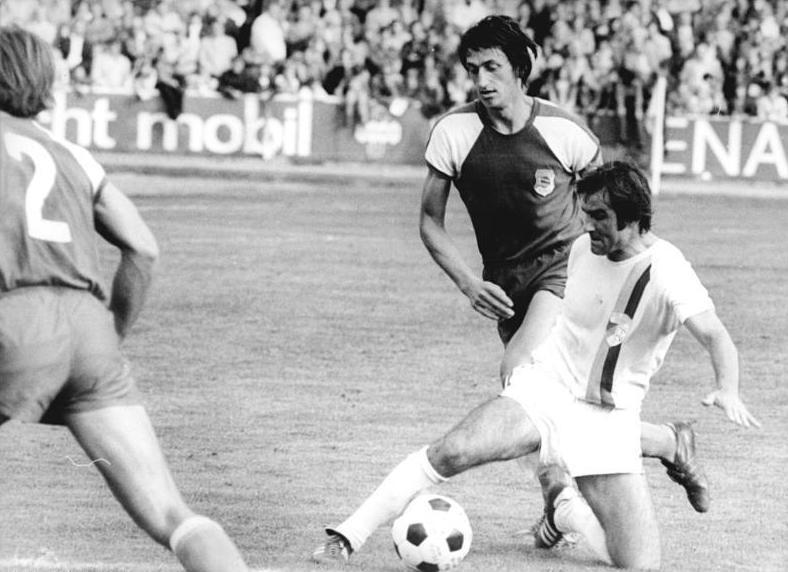 ADN-ZB Liebers 11.9.76 Jena: Fußball-Oberliga FC Carl Zeiss Jena -BSG Stahl Riesa 4: 2 Bei dem 4: 2 Heimsieg seines Jenaer Klubs über Stahl Riesa traf der im Oktober 35 Jahre alt werdende Peter Ducke (hier rechts im Zweikampf mit Schlutt) gleich dreimal "ins Schwarze" und steht damit mit 150 Treffern allein an der Spitze der erfolgreichsten Torschützen der DDR.